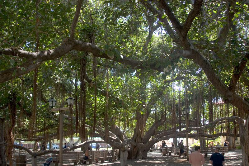 Banyan Shade